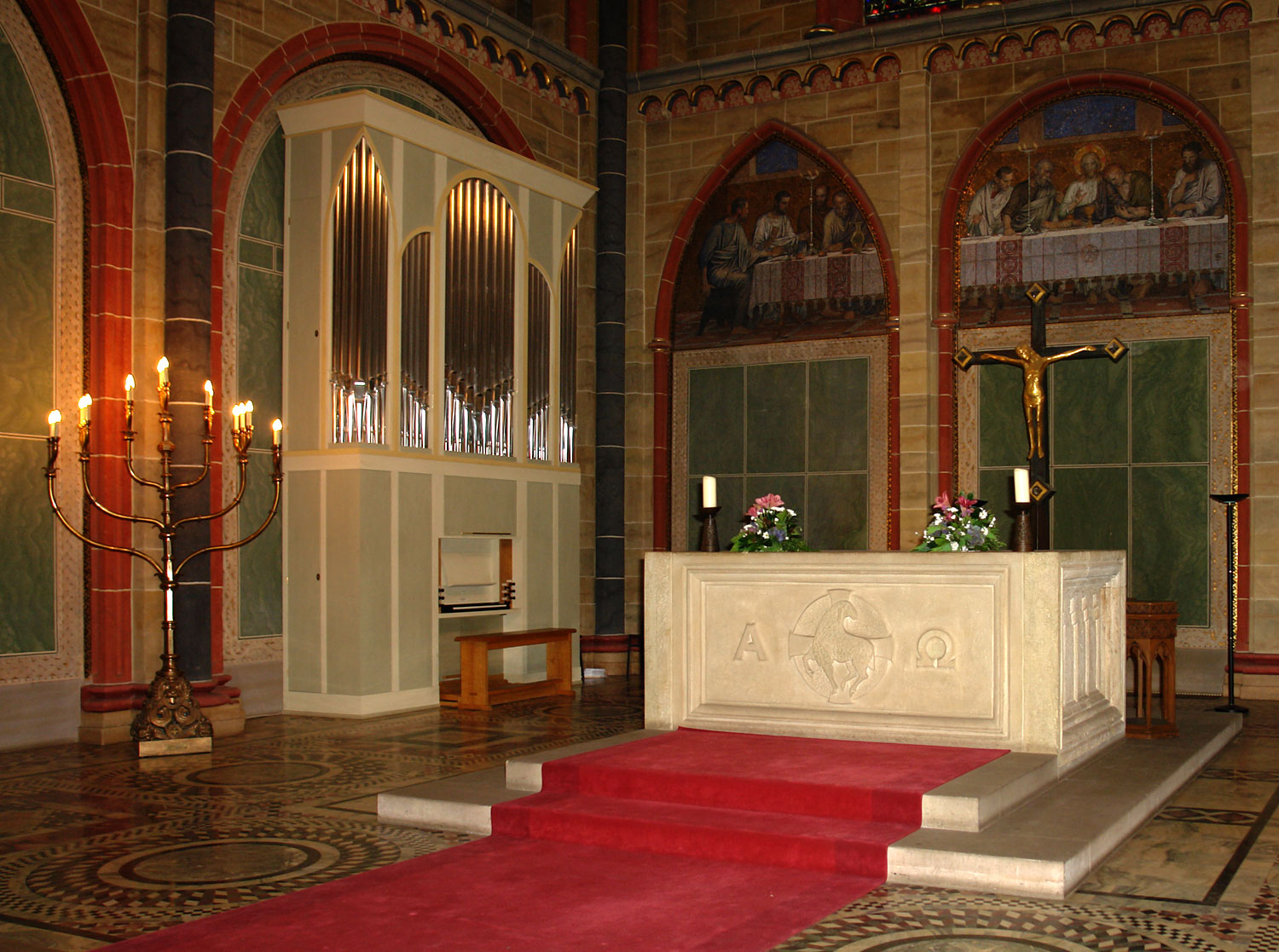 Bremer Dom: Wegscheider-Orgel im Chorraum